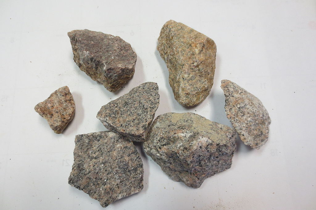 Biyotit taşıyan Granit parçaları